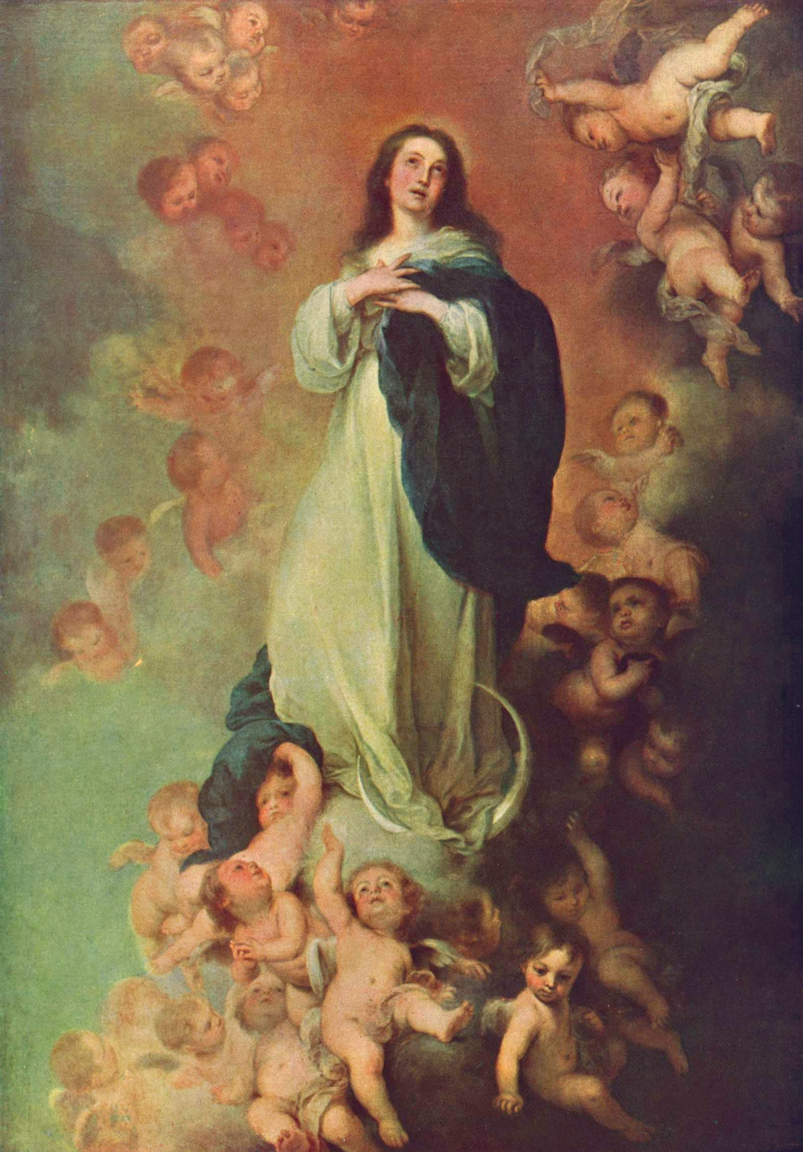 En la mayoría de las Inmaculadas de Bartolomé Esteban Murillo, de las que llegó a pintar unas veinticuatro, la Virgen María aparece vestida con una túnica blanca y un manto de color azul, con sus manos cruzadas sobre el pecho, y al mismo tiempo con una luna creciente a sus pies y con la vista puesta en el Cielo. Esta obra le fue encargada a Murillo por Justino de Neve (1625-1685), que era un canónigo de la catedral de Sevilla, con destino al Hospital de los Venerables de la ciudad de Sevilla, ya que en España se había extendido extraordinariamente desde el siglo XVI la devoción por la Inmaculada Concepción de María, siendo además dicho país el principal defensor del misterio y el que luchó con mayor insistencia hasta que se convirtió en uno de los dogmas de la Fe católica, aunque ello no ocurriría oficialmente hasta el año 1854. A lo largo de su vida, Murillo pintó unas dos docenas de Inmaculadas que en la actualidad se encuentran repartidas por todo el mundo, aunque cuatro de ellas se conservan en el Museo del Prado y otras tantas en el Museo de Bellas Artes de Sevilla, la ciudad natal del pintor.